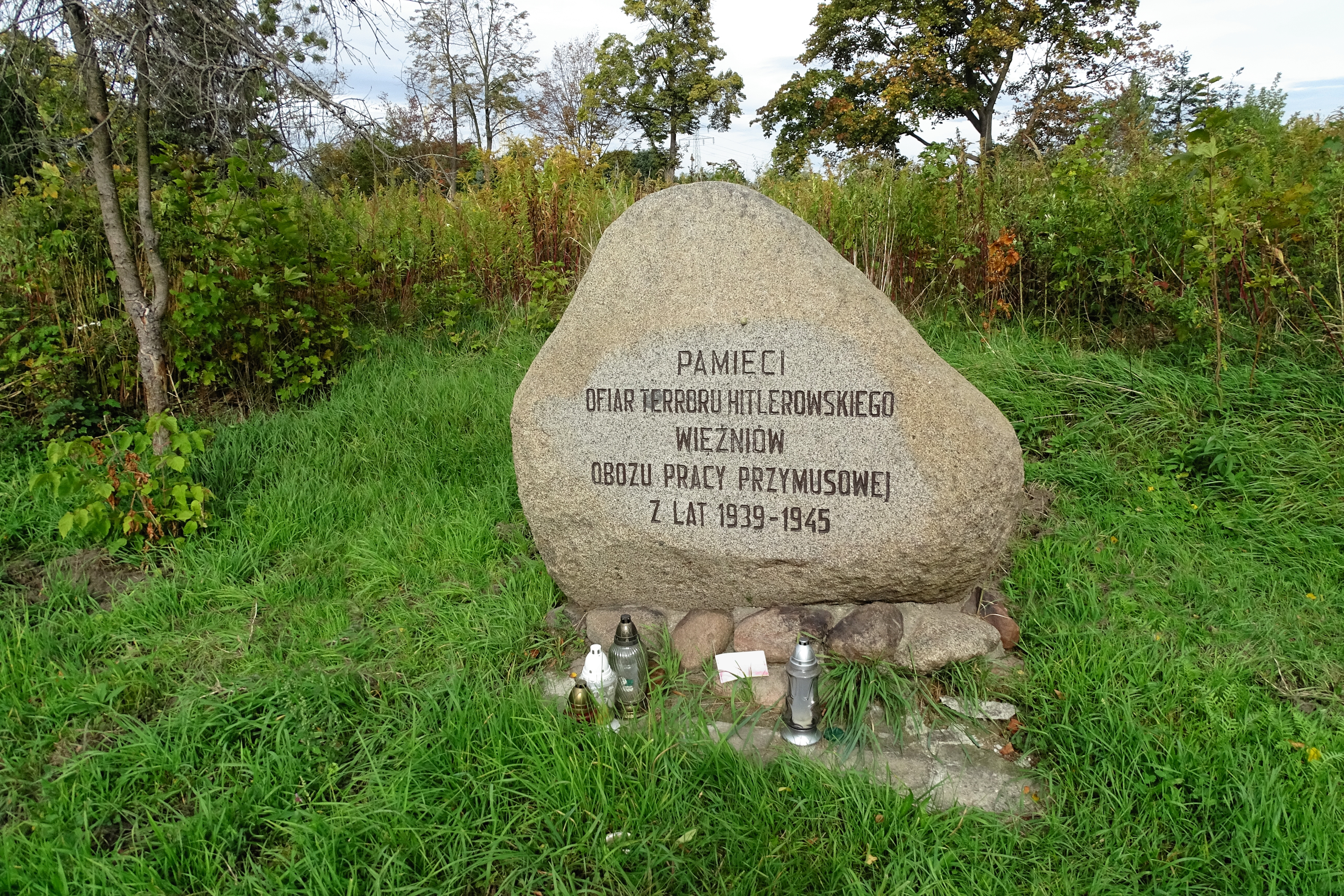 Pomnik ku czci więźniów niemieckiego obozu pracy przymusowej na Sołtysowicach (1940-1945), IX 2019, al. Poprzeczna koło skrzyżowania z al. Kanonierską